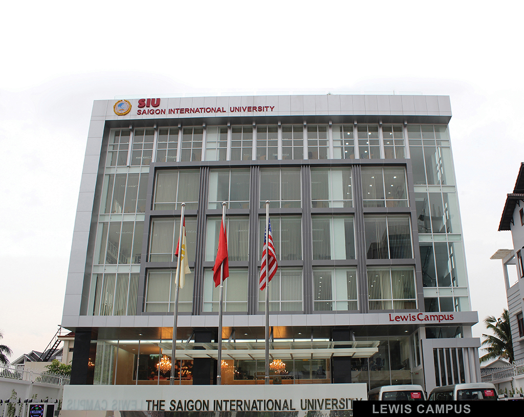 Fleming campus